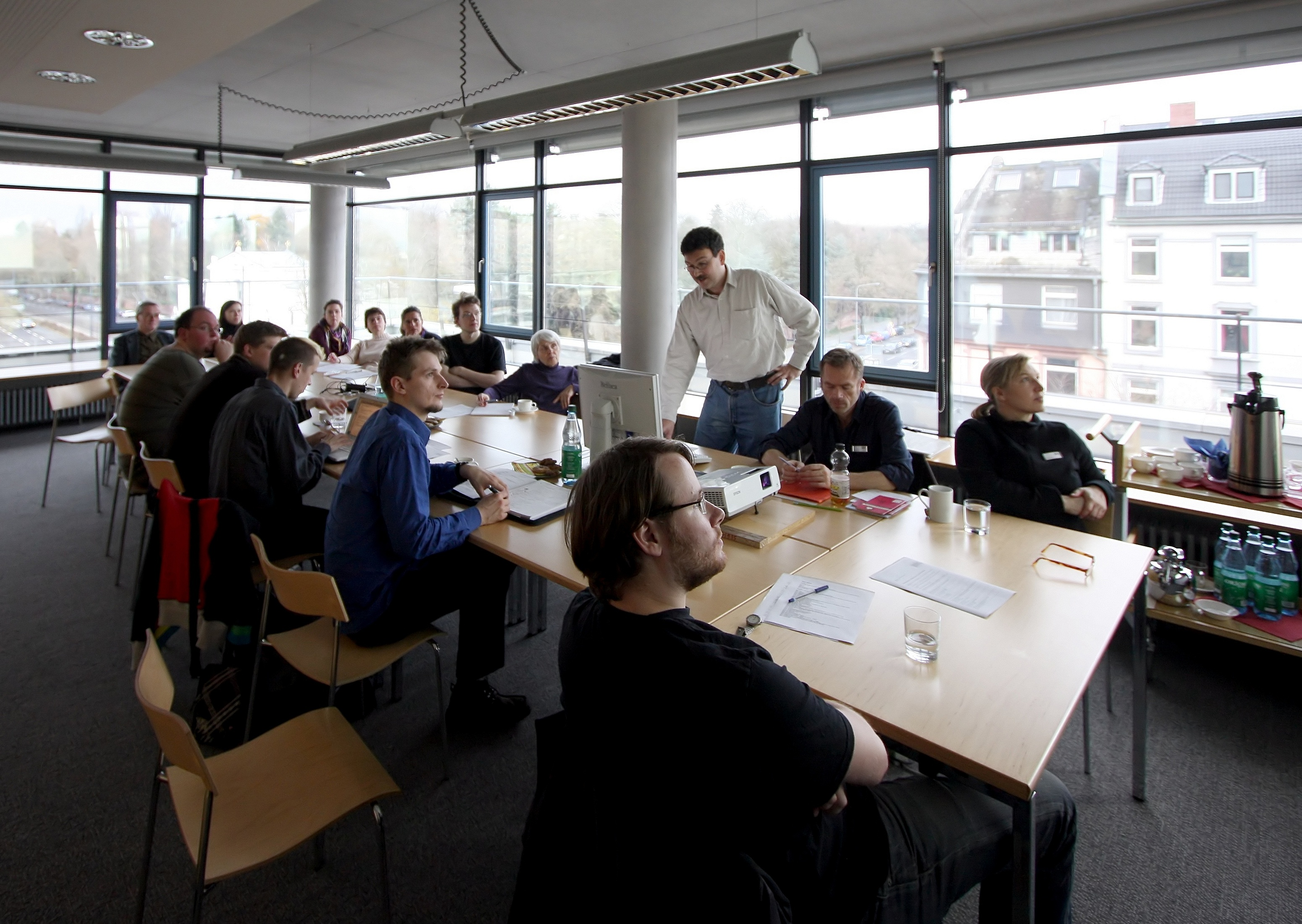 Informationsbesuch von Wikipedianers in der PND-Redaktion der Deutschen Nationalbibliothek